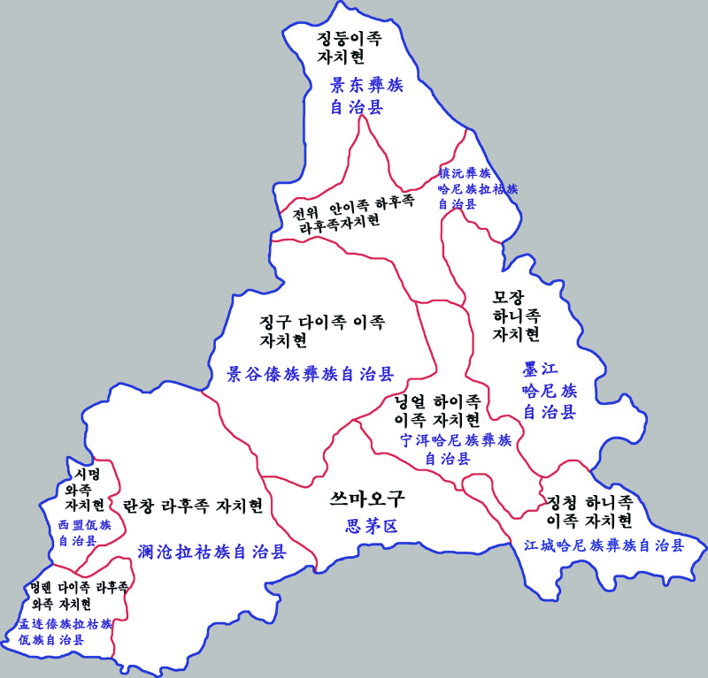 푸얼시 현급행정구역